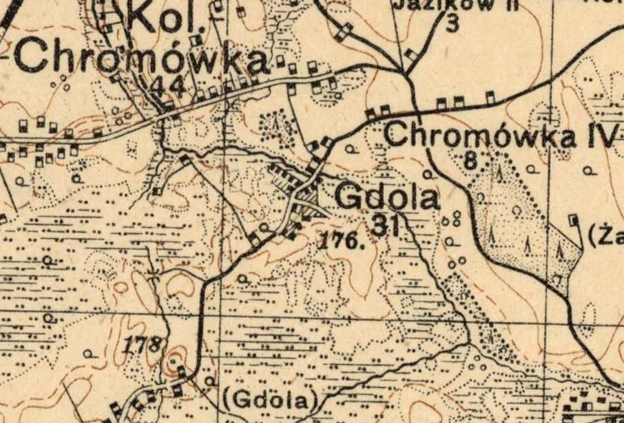 Gdola (powiat chełmski) na mapie Wojskowego Instytutu Geograficznego z 1931 r.